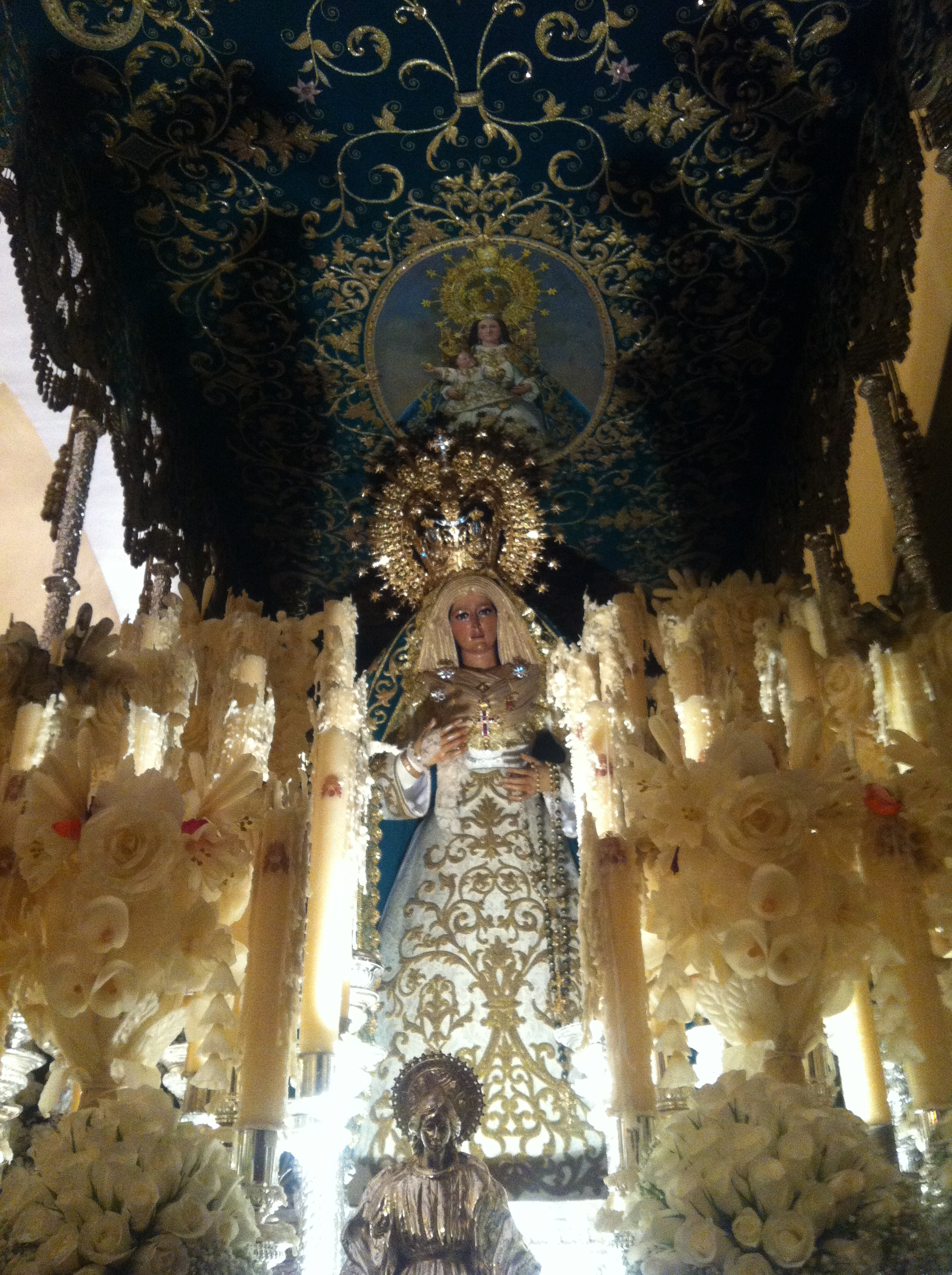 Imagen de Nuestra Señora de la Esperanza de Alicante, de la parroquia de la Misericordia, en una imagen en su paso de palio tras la Semana Santa de 2013.